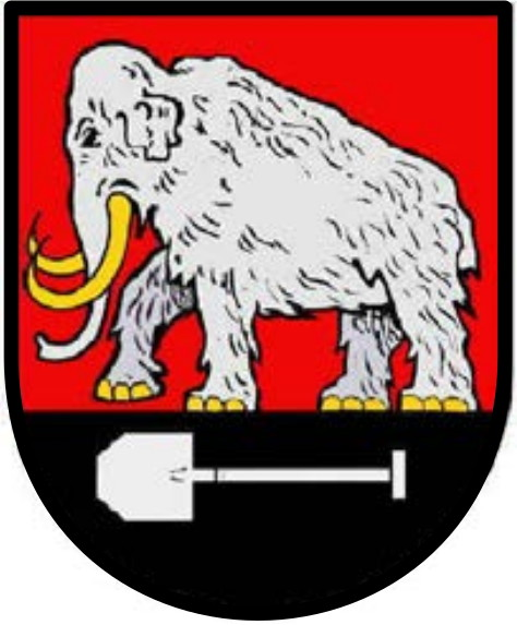 Die Reste des vollhaarigen Mammuts wurden im Godenstedter Süßwasserkalk bei Grabungen gefunden. Das Tier lebte in einer Zwischeneiszeit in dieser Gegend.